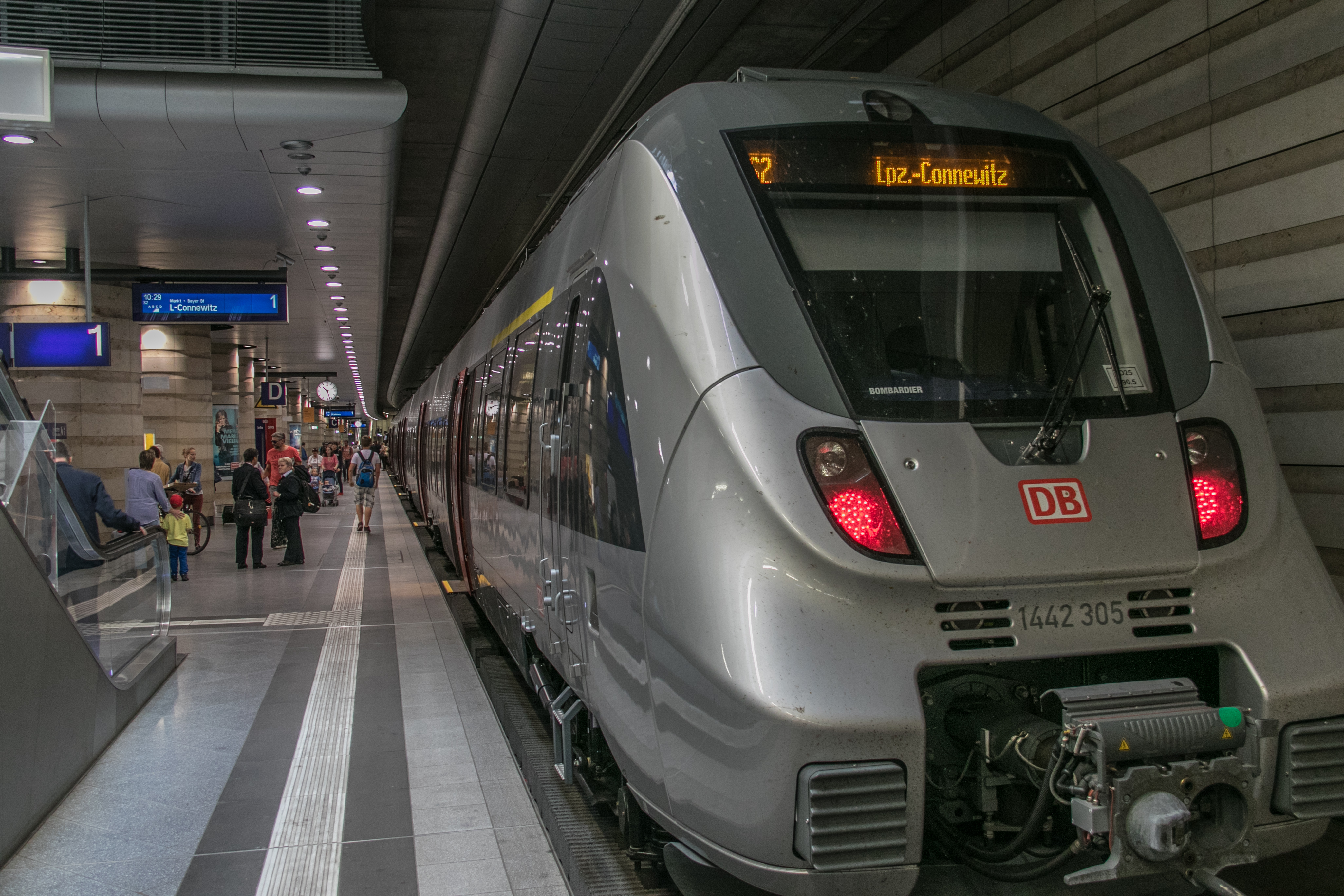 Talent 2, erster Einsatz für S-Bahn Mitteldeutschland II auf der S2 - Station Hauptbahnhof